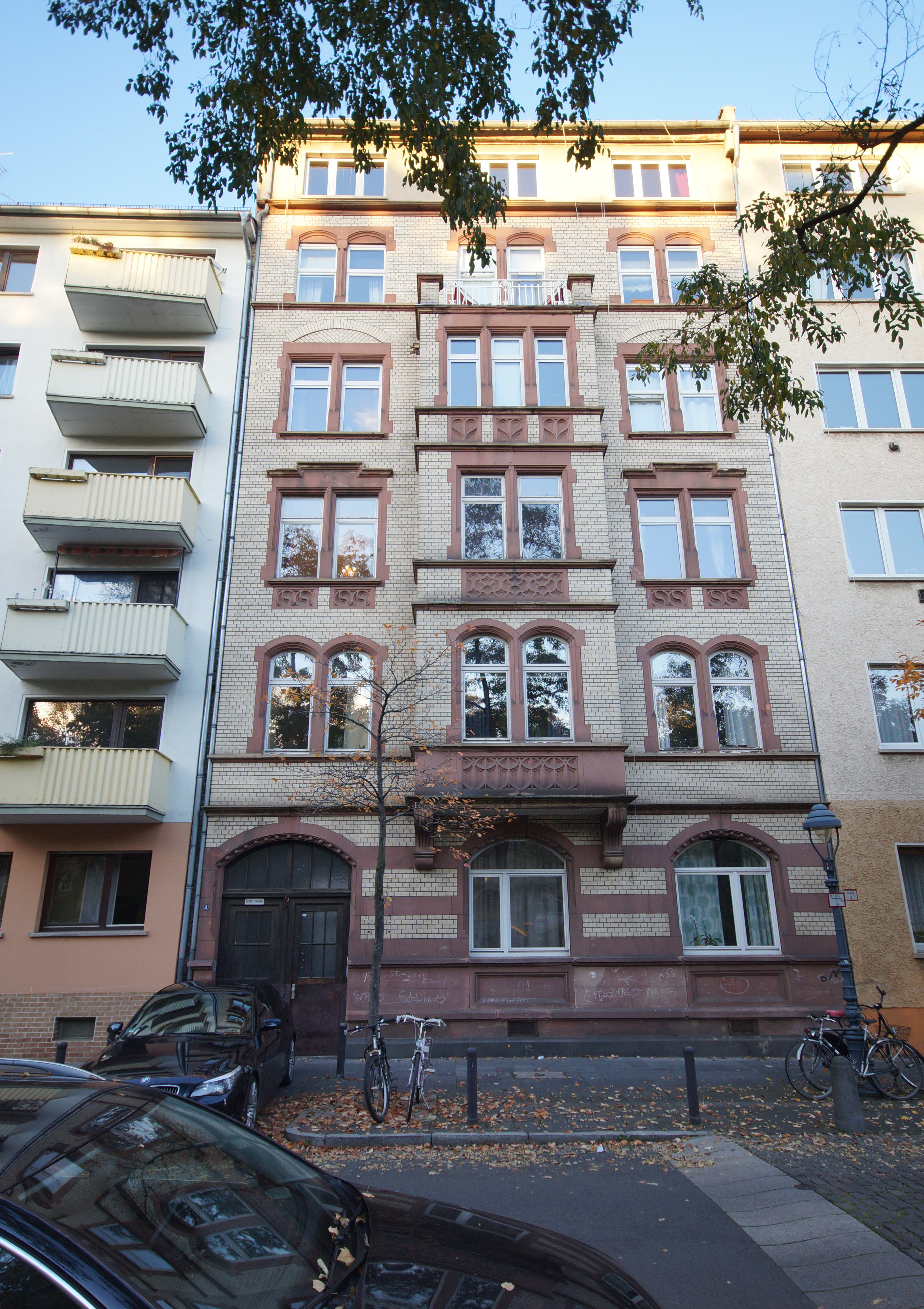 Die Fassade der Hausnummer 4 am Peter-Cornelius-Platz in Mainz-Neustadt